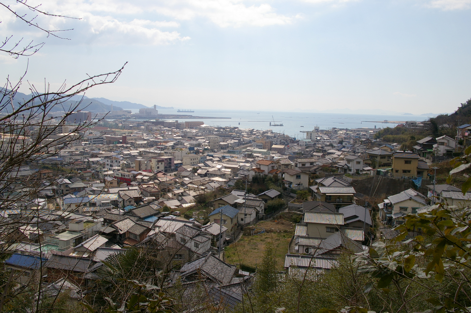 阿賀町眺望